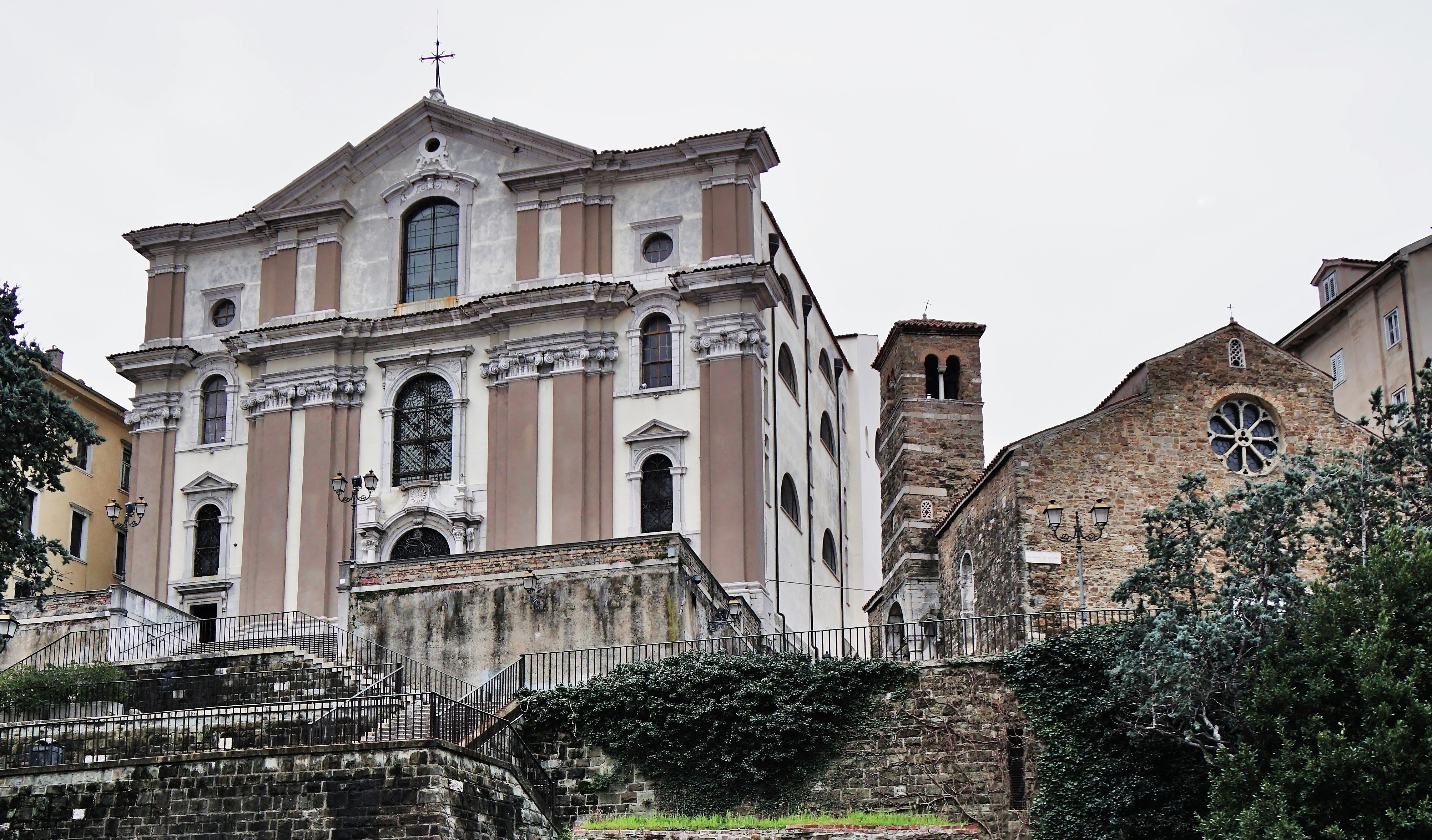 Triest, die Kirche Santa Maria Maggiore und rechts davon die kleine Kirche San Silvestro